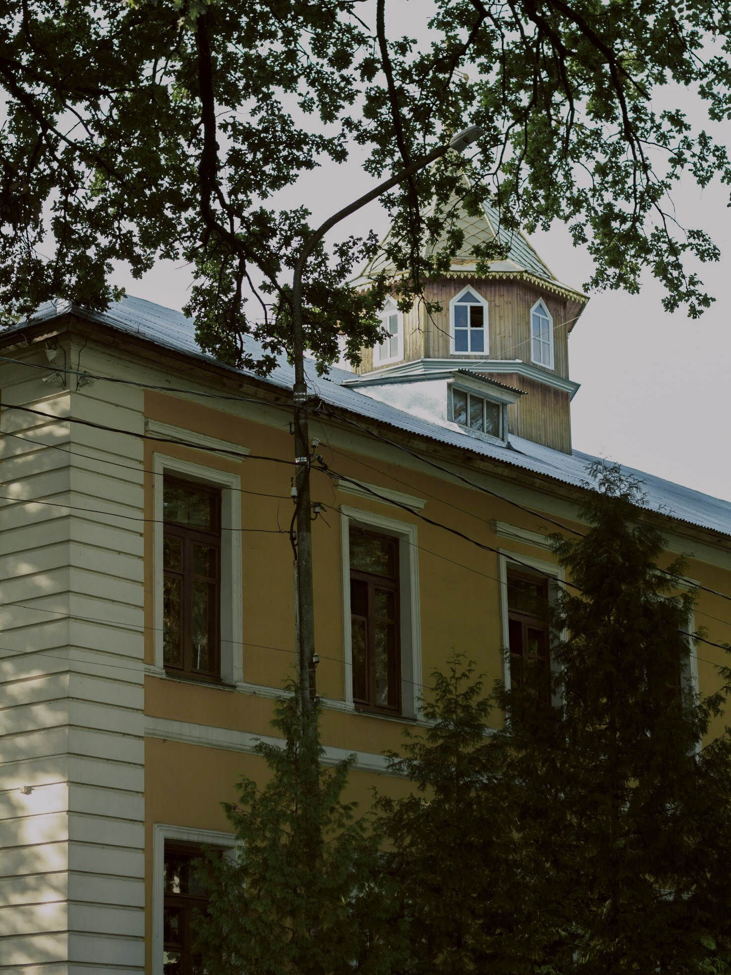 Здание казарм Дорогобужского полка: улица Покровская Гора, 5, Брянск, Брянская область